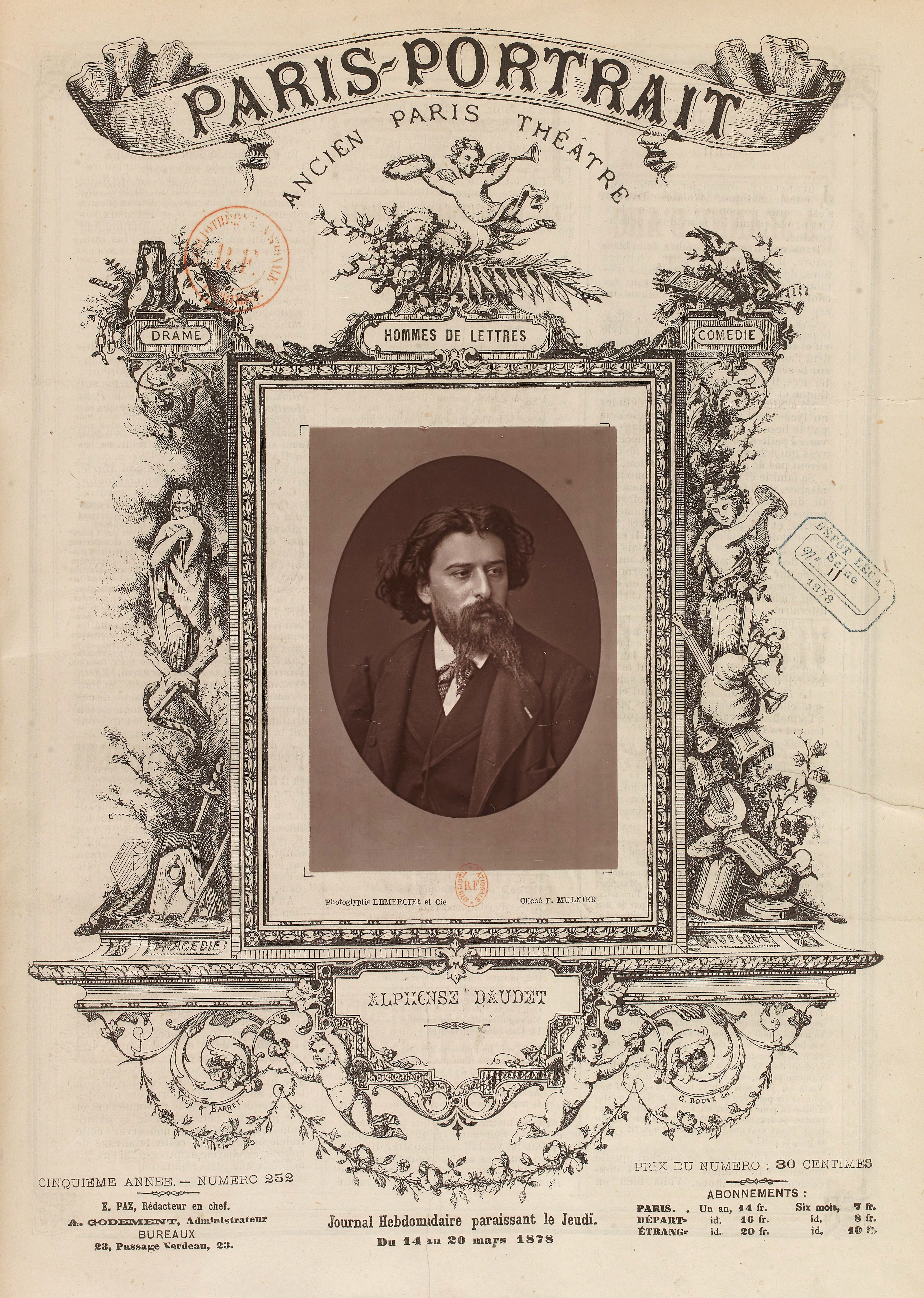 Hebdomadaire Paris-Portrait (ancien Paris-Théatre), n°262, 14 mars juin 187_. Photographie d'Alphonse Daudet par Ferdinand Mulnier. Photoglyptie (woodburytype) par Alfred Lemercier et décors par Yves et Barret.